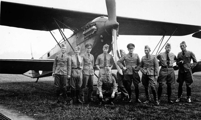 Foto. Itze Hamstra, Anton Harmsen, Jan Theunissen, Jan Bruinier, Jan Lukkien, Harm v, Weerden, Piet Engels, Jan Wolfsema, Harry Otten, Van Wierda, Hooyer, Peters, Anton Weber, John Mousson Op de achterzijde staan meer namen dan op de foto afgebeelde personen.. Groepsportret van vliegeniers, Andir